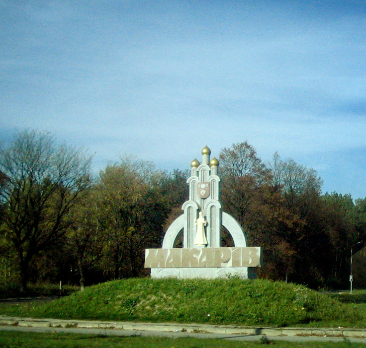 смт. Макарів